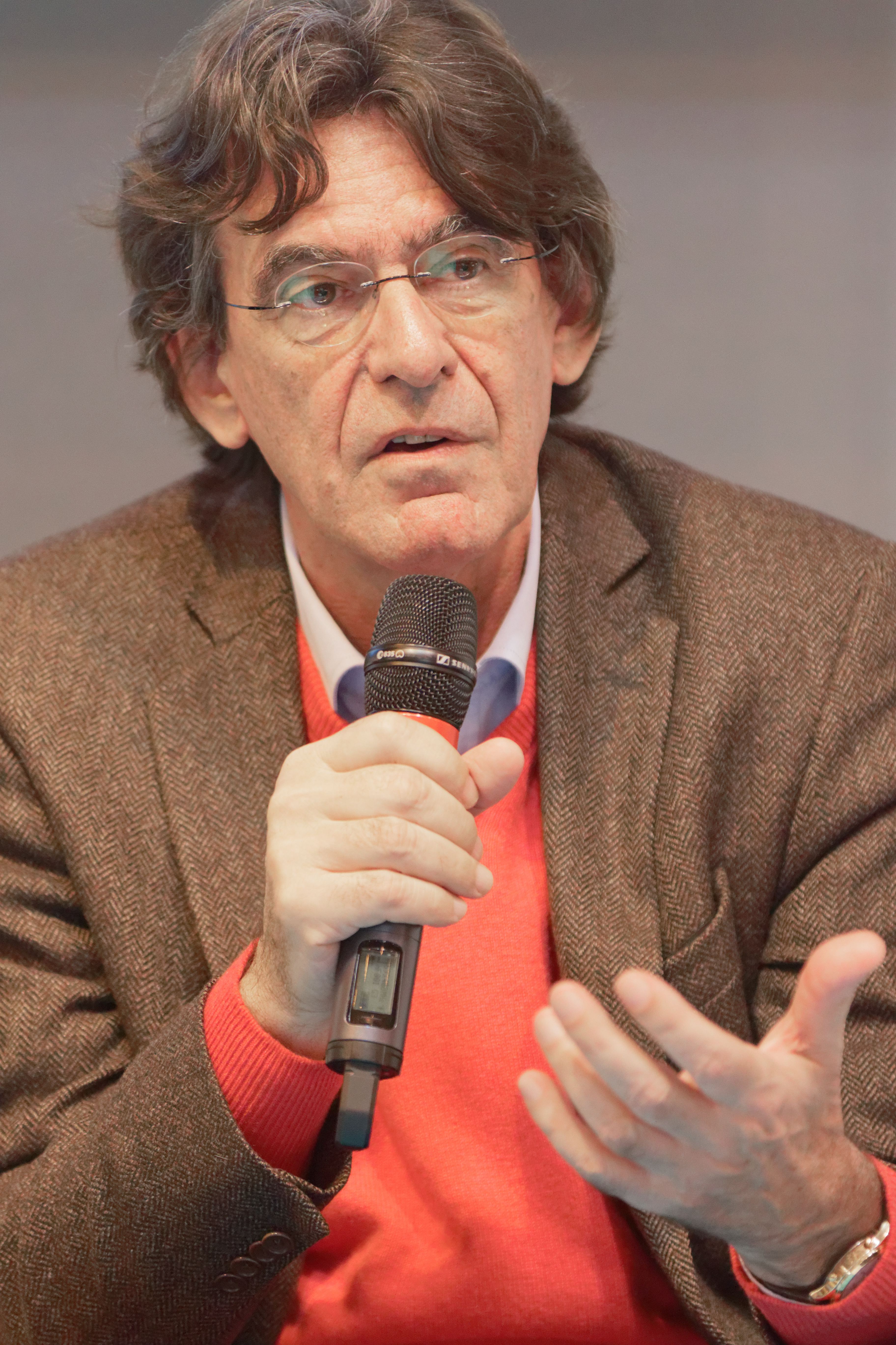 Luc Ferry en conférence lors du salon du livre de Paris 2017.